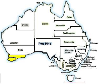 Eigenarbeit